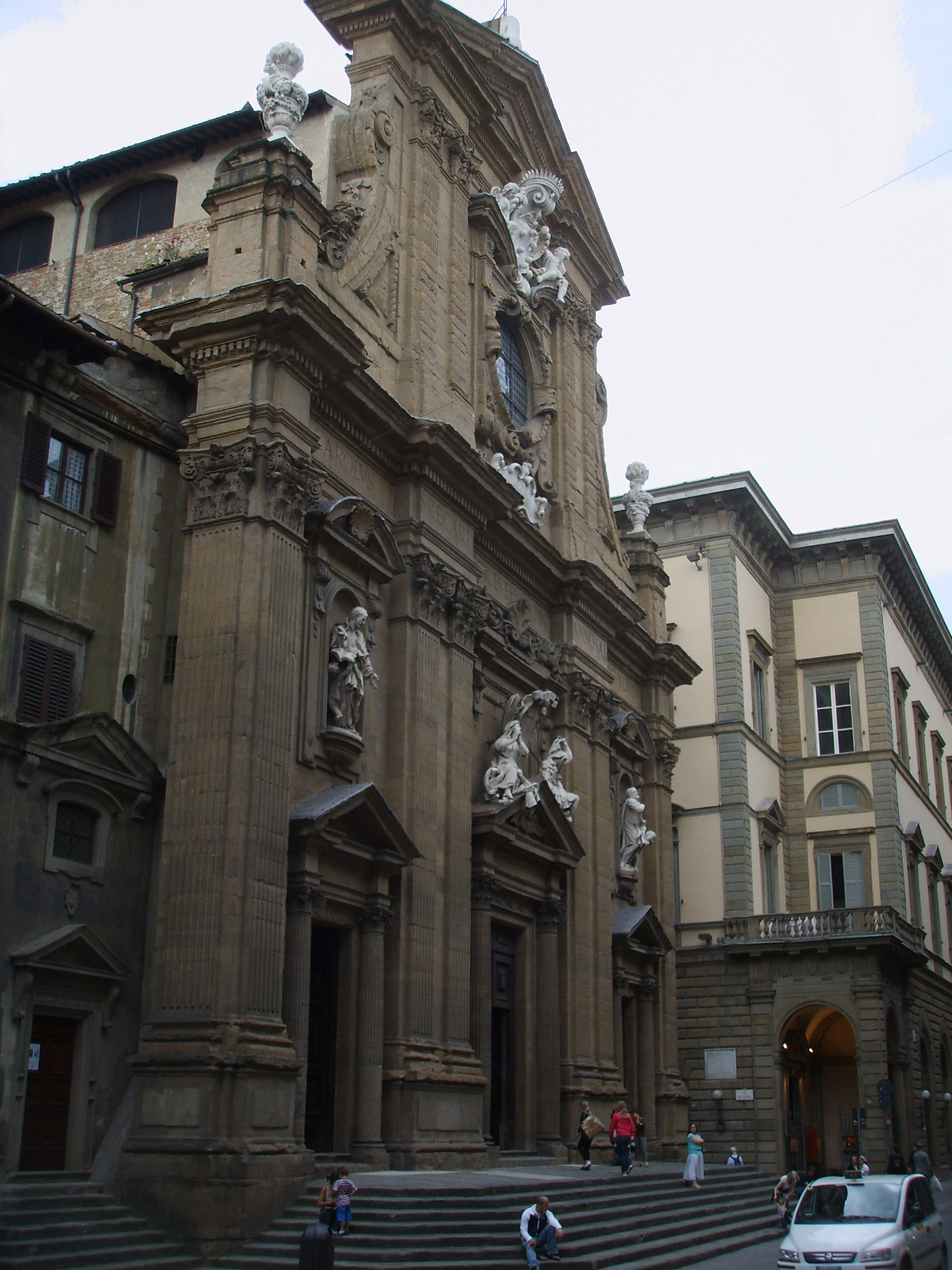 San Gaetano, facciata